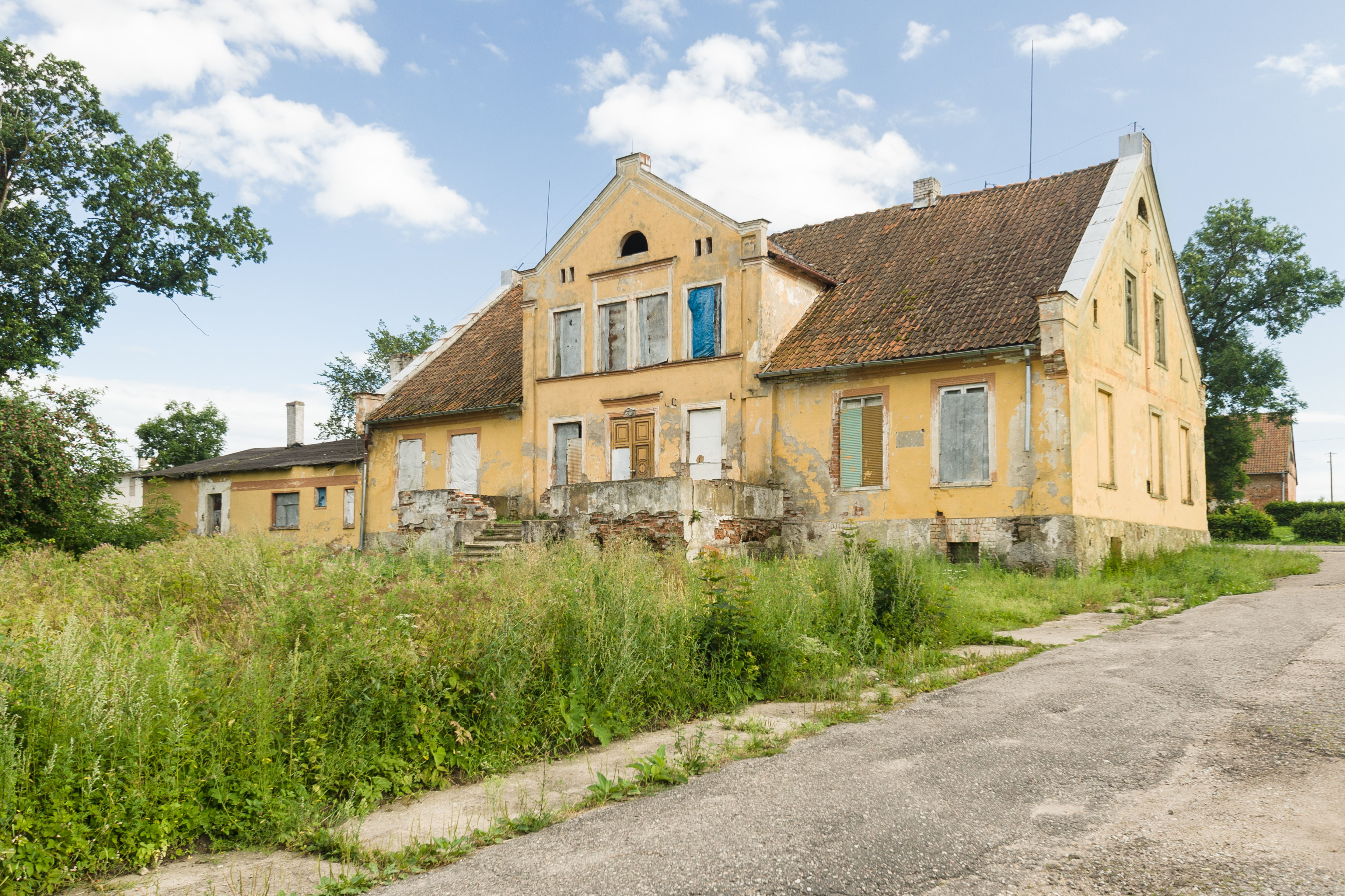 Zabytkowy zespół dworski z 1895 roku w Kotkowie, powiat kętrzyński. 09.1992.